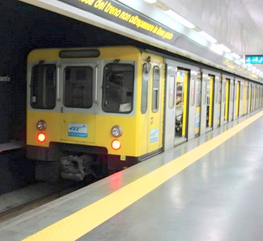 linea 1 metro napoli